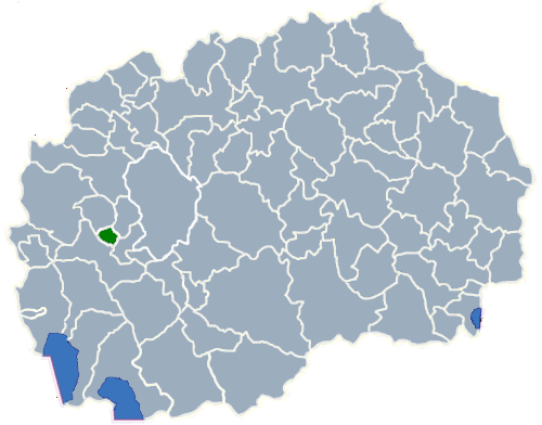 Map of Opština Kičevo (Кичево)